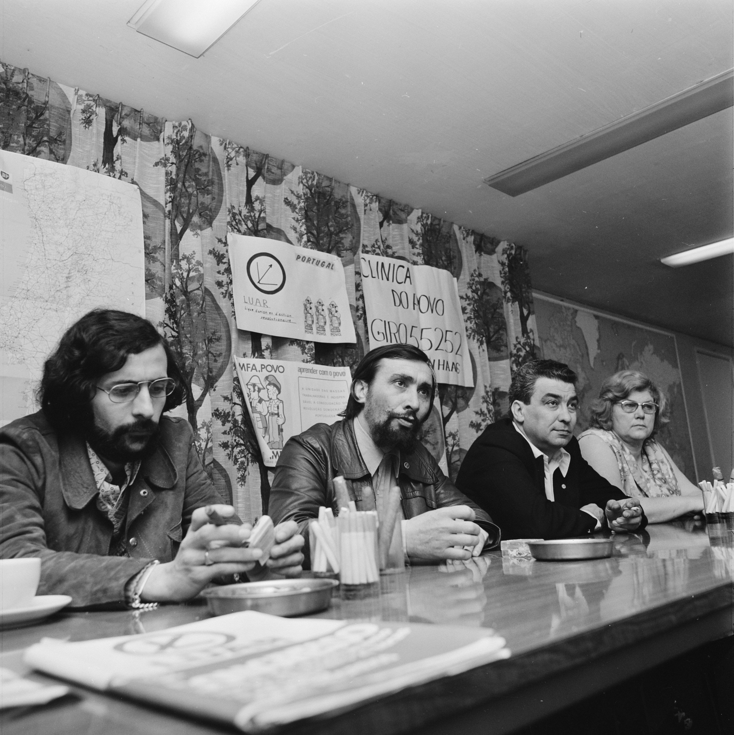 Persconferentie in Den Haag van de Portugese beweging LUAR (Liga voor Eenheid en Revolutionaire Actie). Vlnr Camilo Mortágua, Fernando Pereira (woordvoerder LUAR), Aurelio Zevedo en echtgenote (vertegenwoordiging LUAR in Nederland) Datum 20 mei 1975